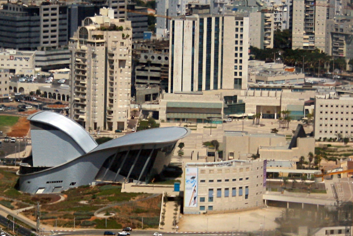 היכל התרבות של אשדוד.